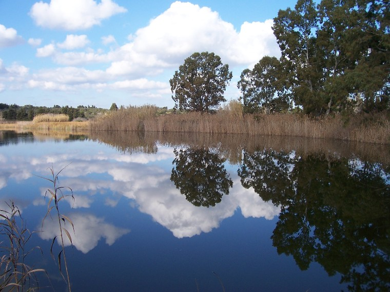 idrusa, kodak, no licence, Lago Alimini Grande senza vento, no licence, ...